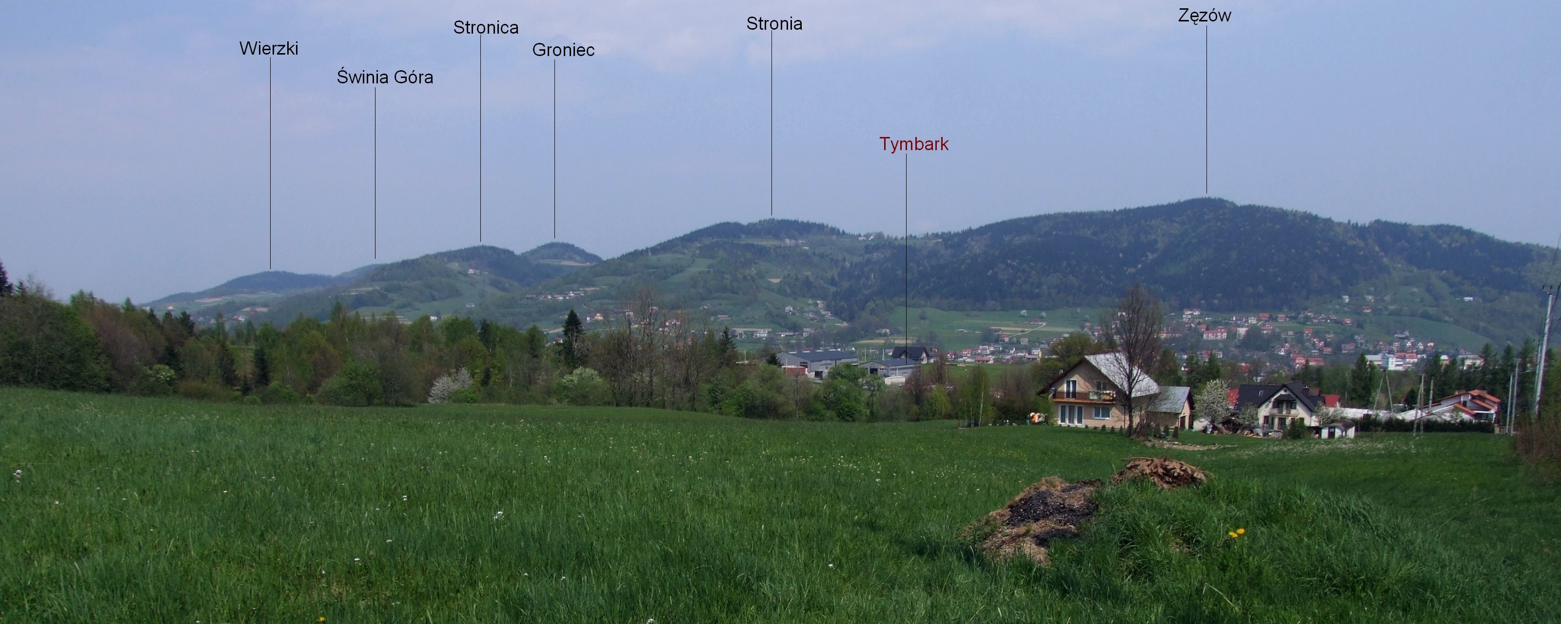 Pasmo Zęzowa. Widok z szosy Nowy-Sącz Mszana Dolna.